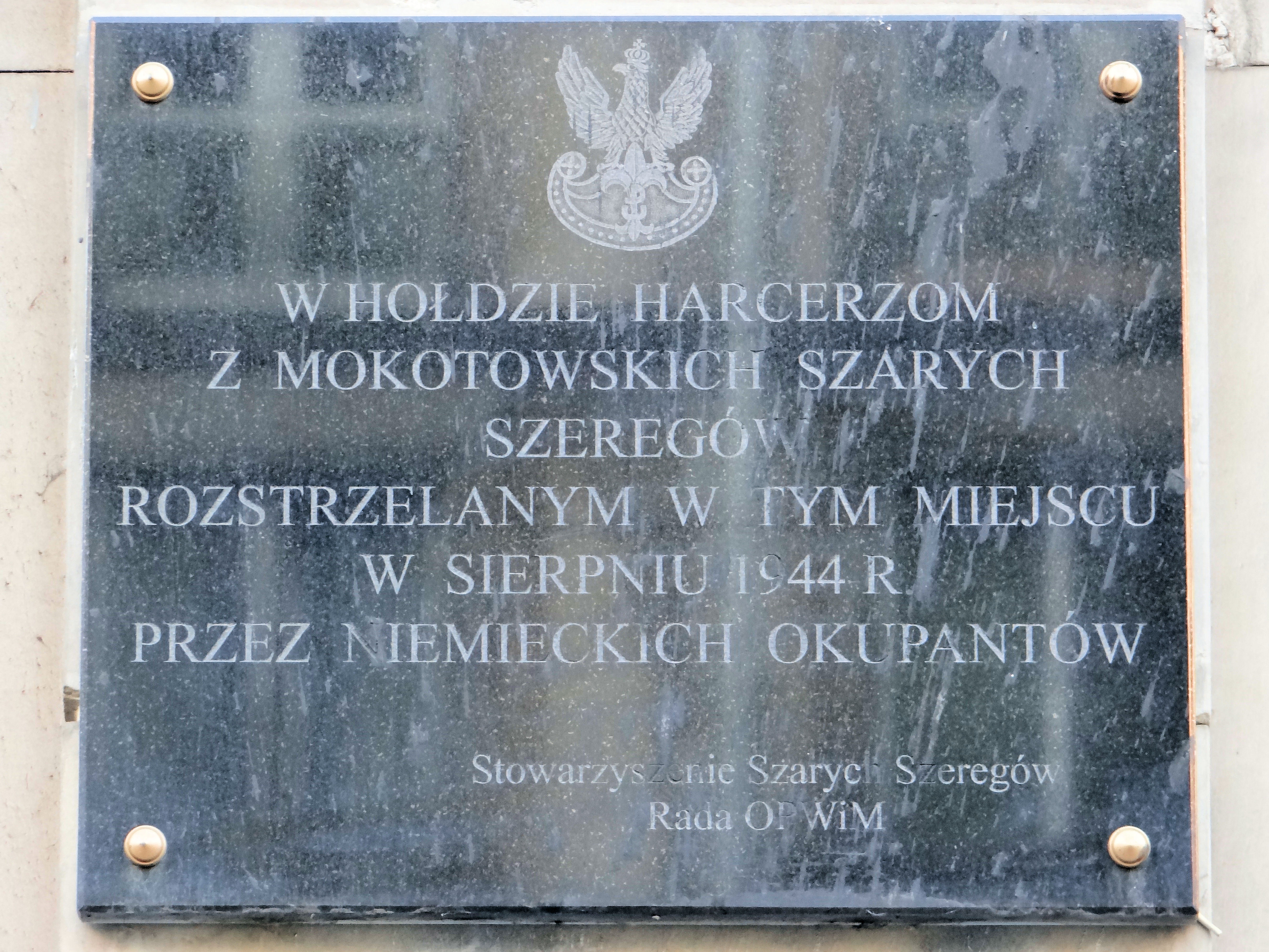 Tablica poświęcona pamięci harcerzy z Mokotowskich Szarych Szeregów przy ul Marszałkowskiej 27/35 w Warszawie